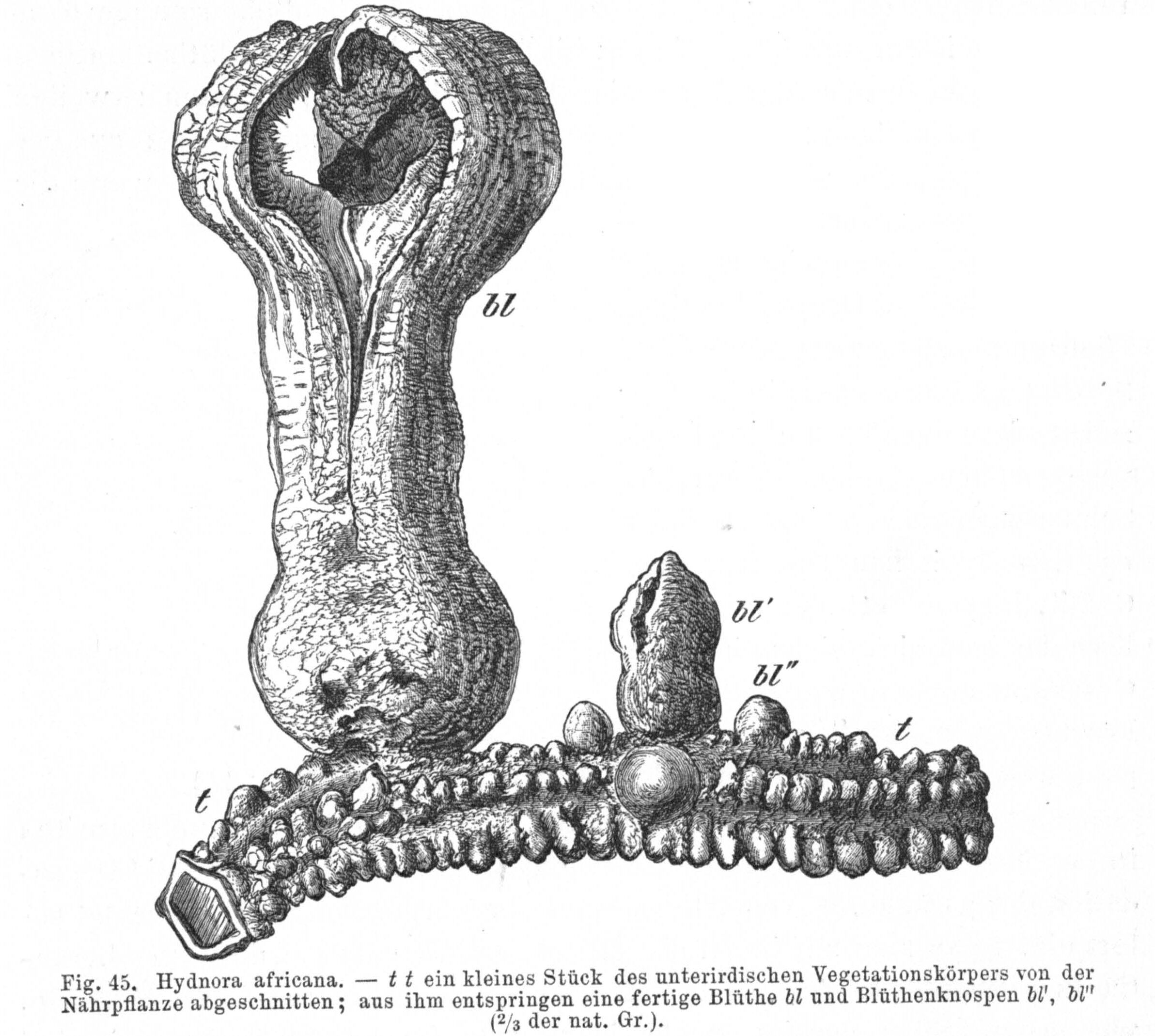 Hydnora africana. t t = kleines Stück des unterirdischen Vegetationskörpers von der Nährpflanze abgeschnitten. Aus ihm entspringen eine fertile Blüte (bl) und Blütenknospen (bl', bl). / tt = small part of underground part of plant. bl = open flower, bl', bl = flower buds.